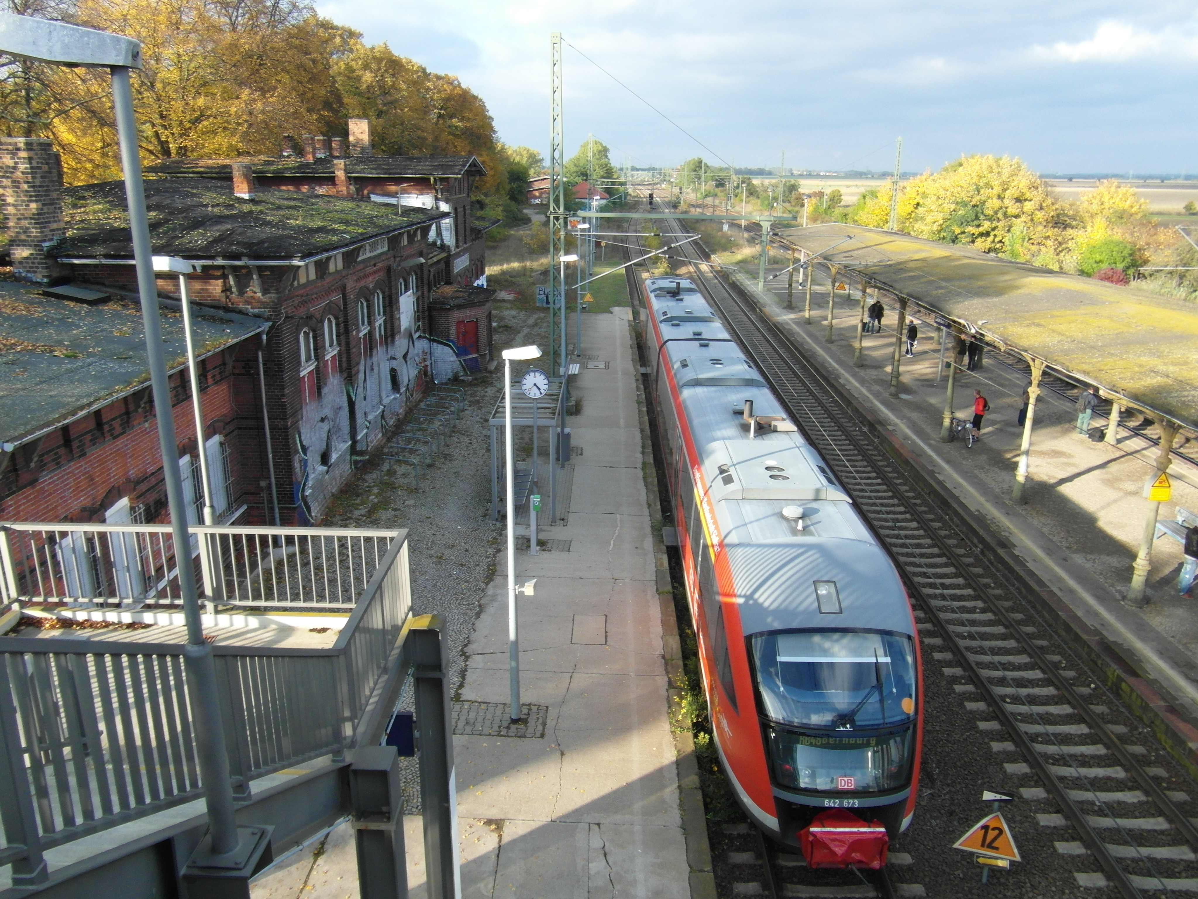 Im Salzlandkreis in Sachsen-Anhalt